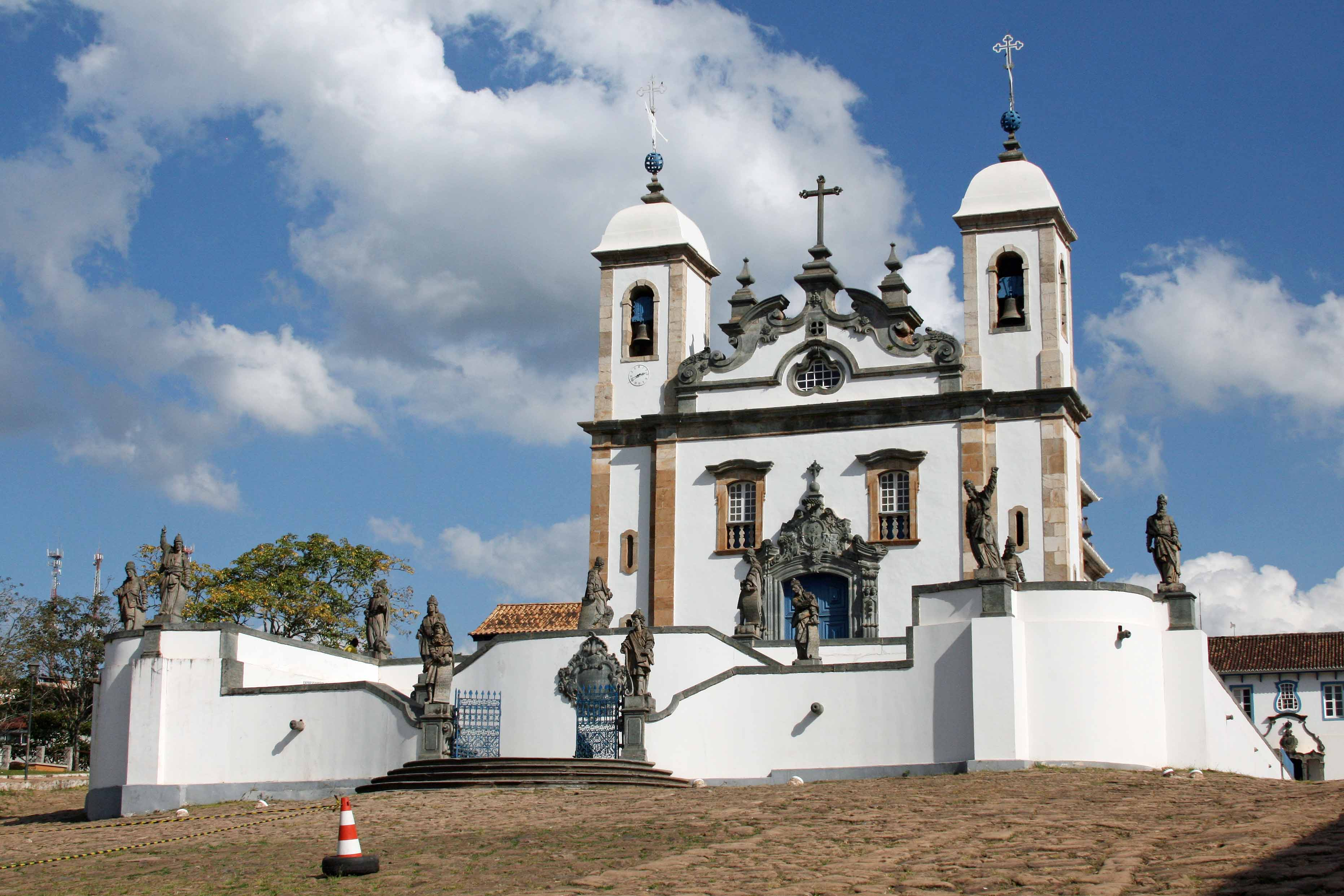 Santuário do Bom Jesus de Matosinhos - Basílica e adro com escadaria e estátuas - Congonhas do Campo.